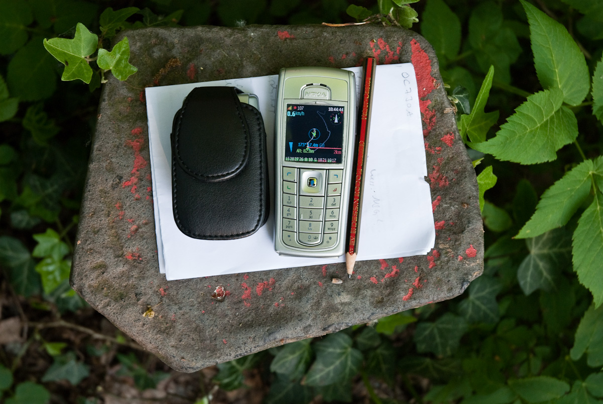 Geocaching mit Telefon und GPS-Empfänger; Nokia 6230i, Navilock/Globalsat BT-338 und Software "vlkgps"